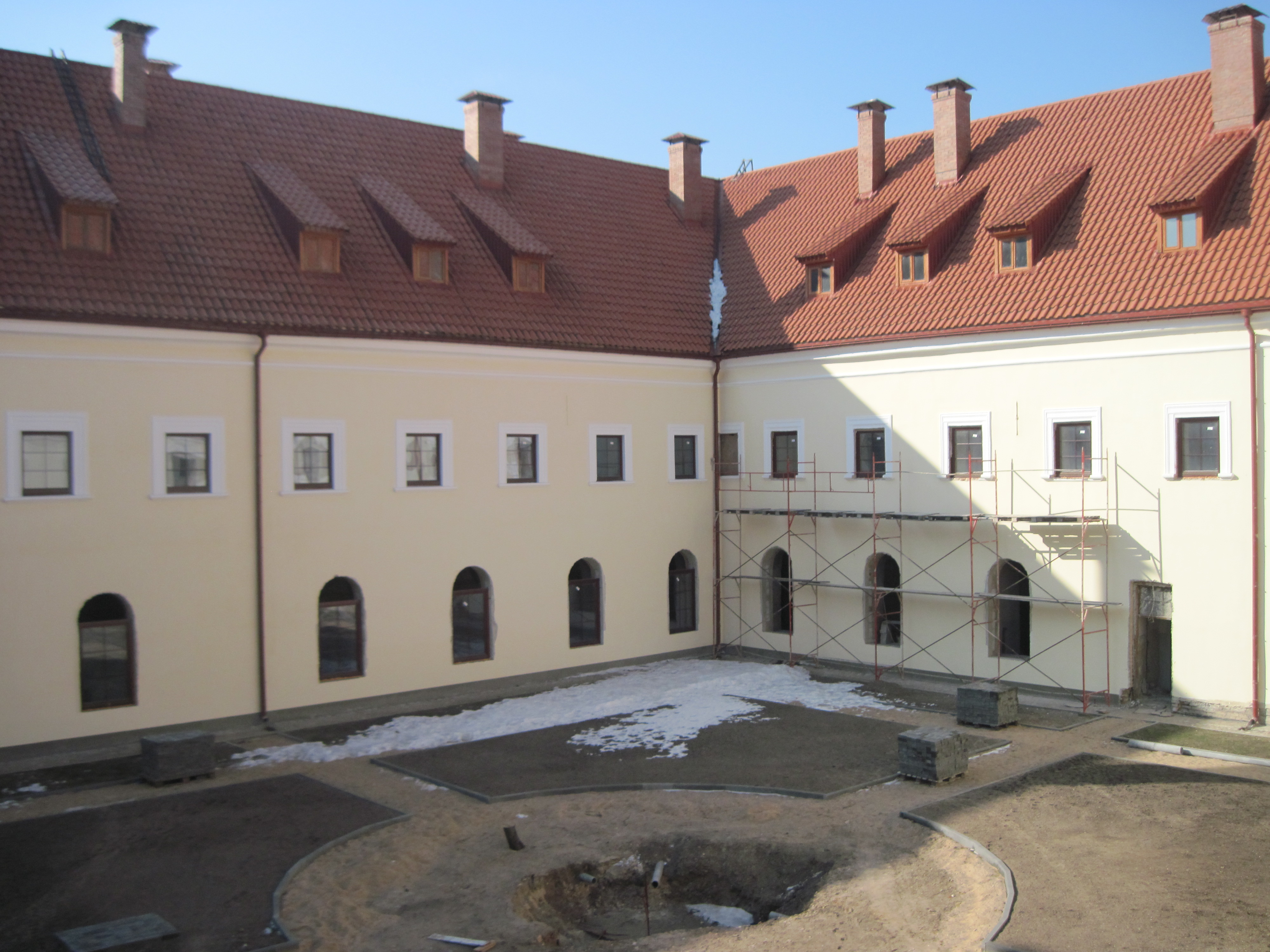 Унутраны двор кляштара брыгітак у Гродне